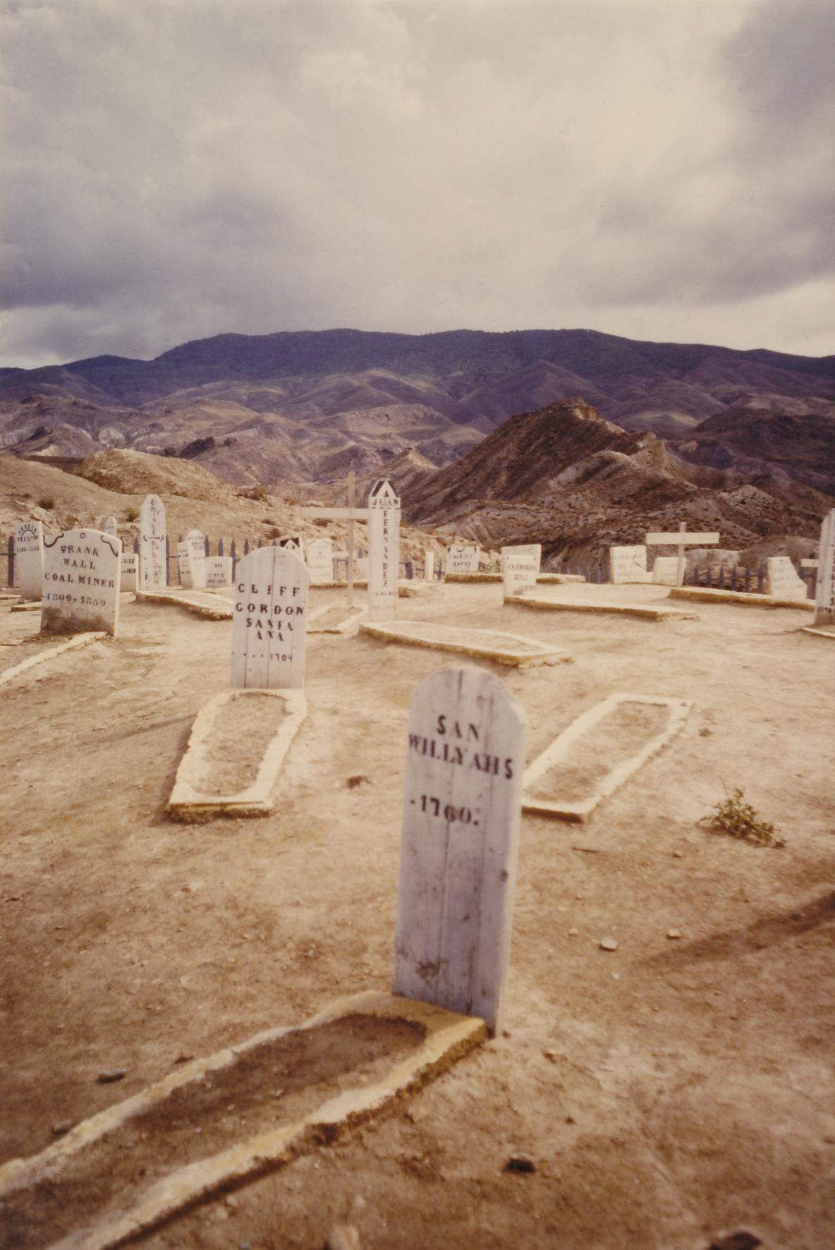 Wild-West Friedhof in "Yucca City" bei Tabernas (Almeria) Datum: 09/1984 Urheber: Michael Pfeiffer alias Benutzer:Gordito1869 Quelle: privates Fotoalbum des Urhebers